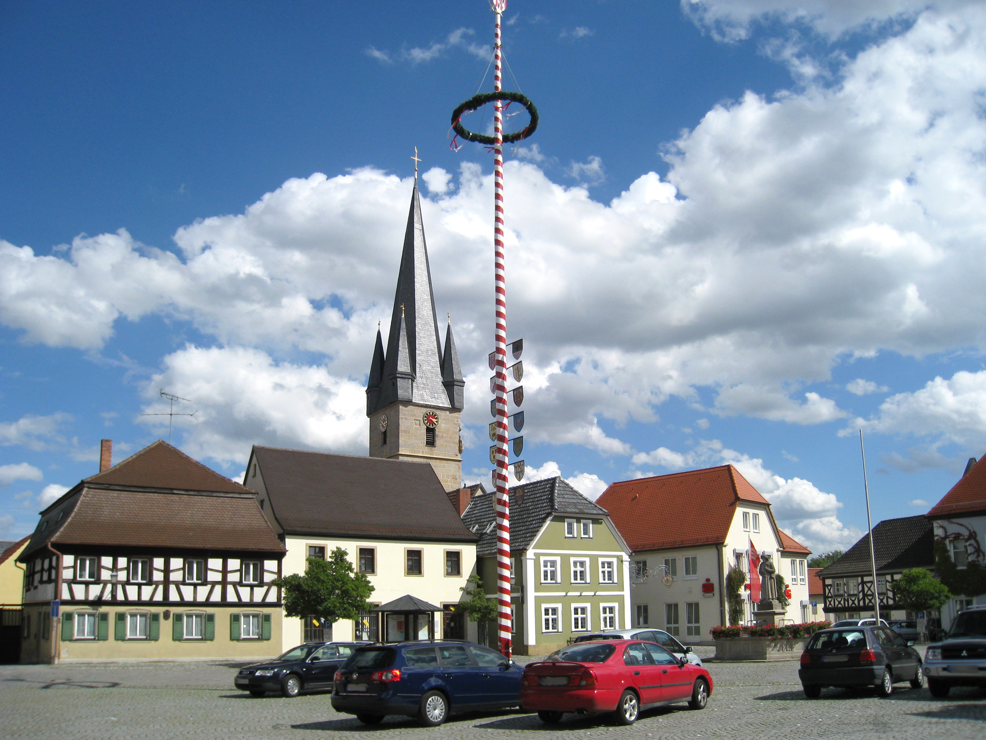 Der Baunacher Marktplatz mich Blick auf die Kirche Sankt Oswald, den Maibaum und den Überkum-Brunnen